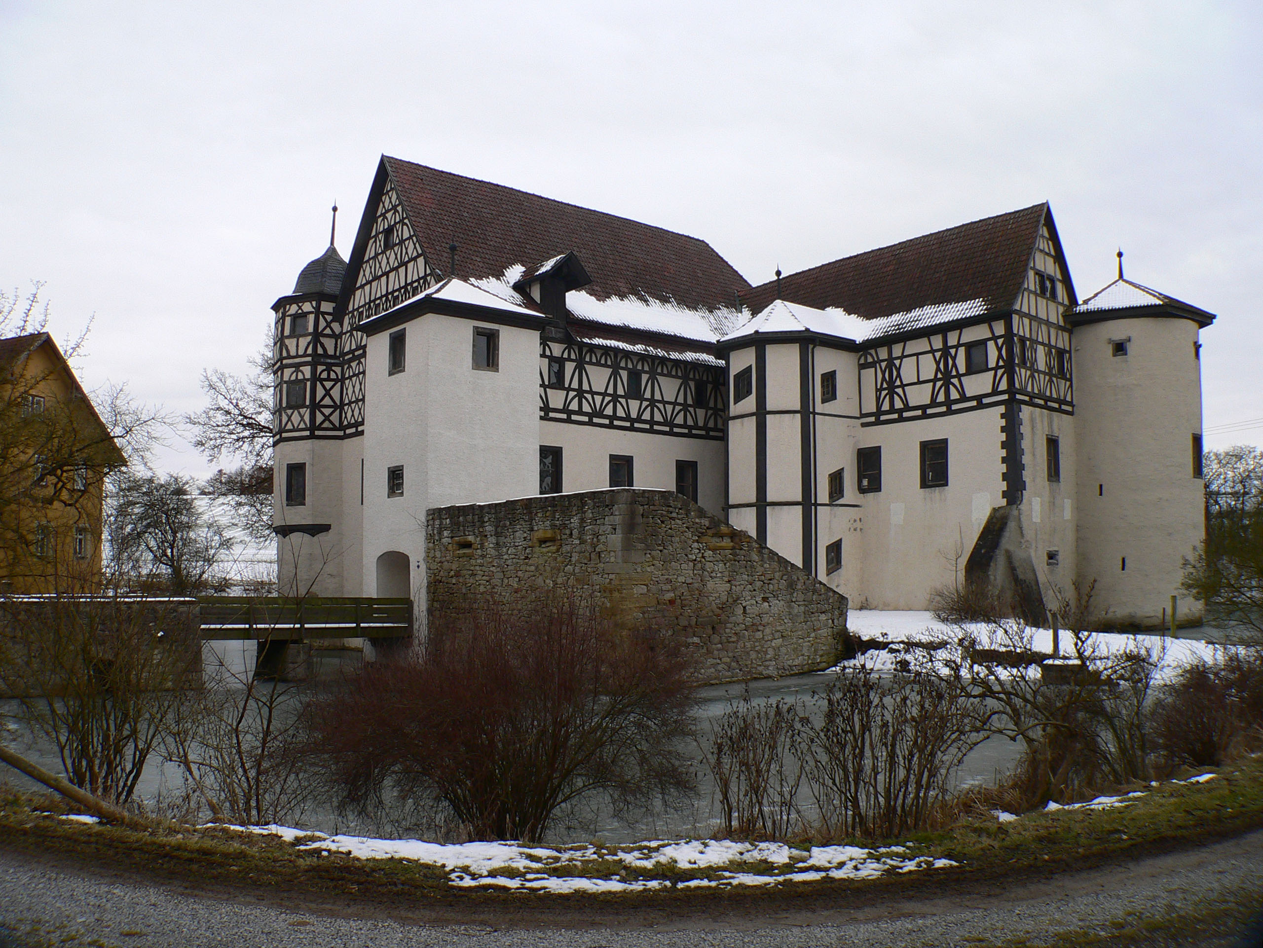 Wasserschloss Rossrieth in Mellrichstadt-Rossrieth, Landkreis Rhön-Grabfeld, Bayern